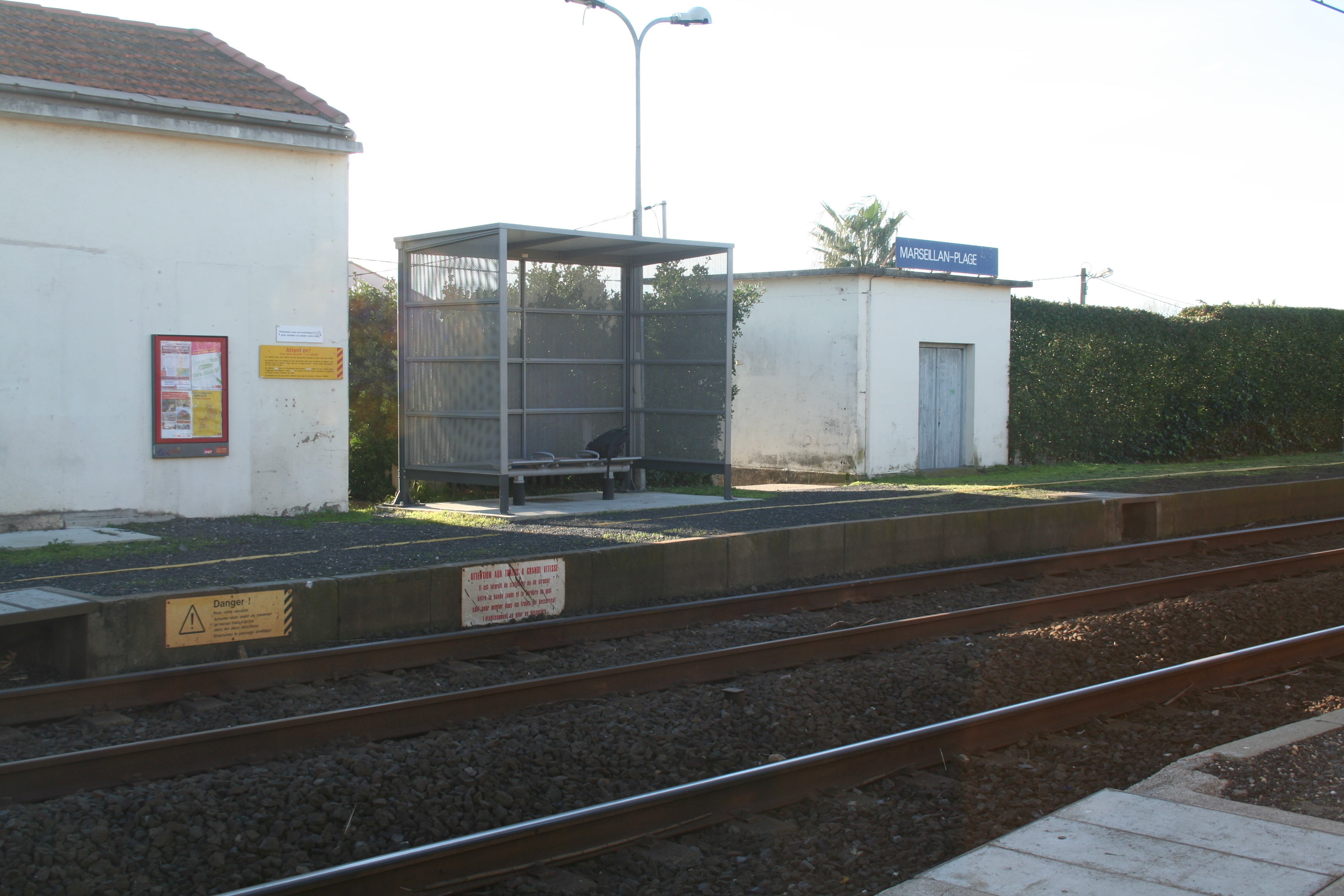 Marseillan (Hérault) - gare de Marseillan-Plage.